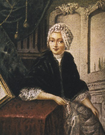 Bildnis der Frau von Moses Mendelssohn, Fromet.